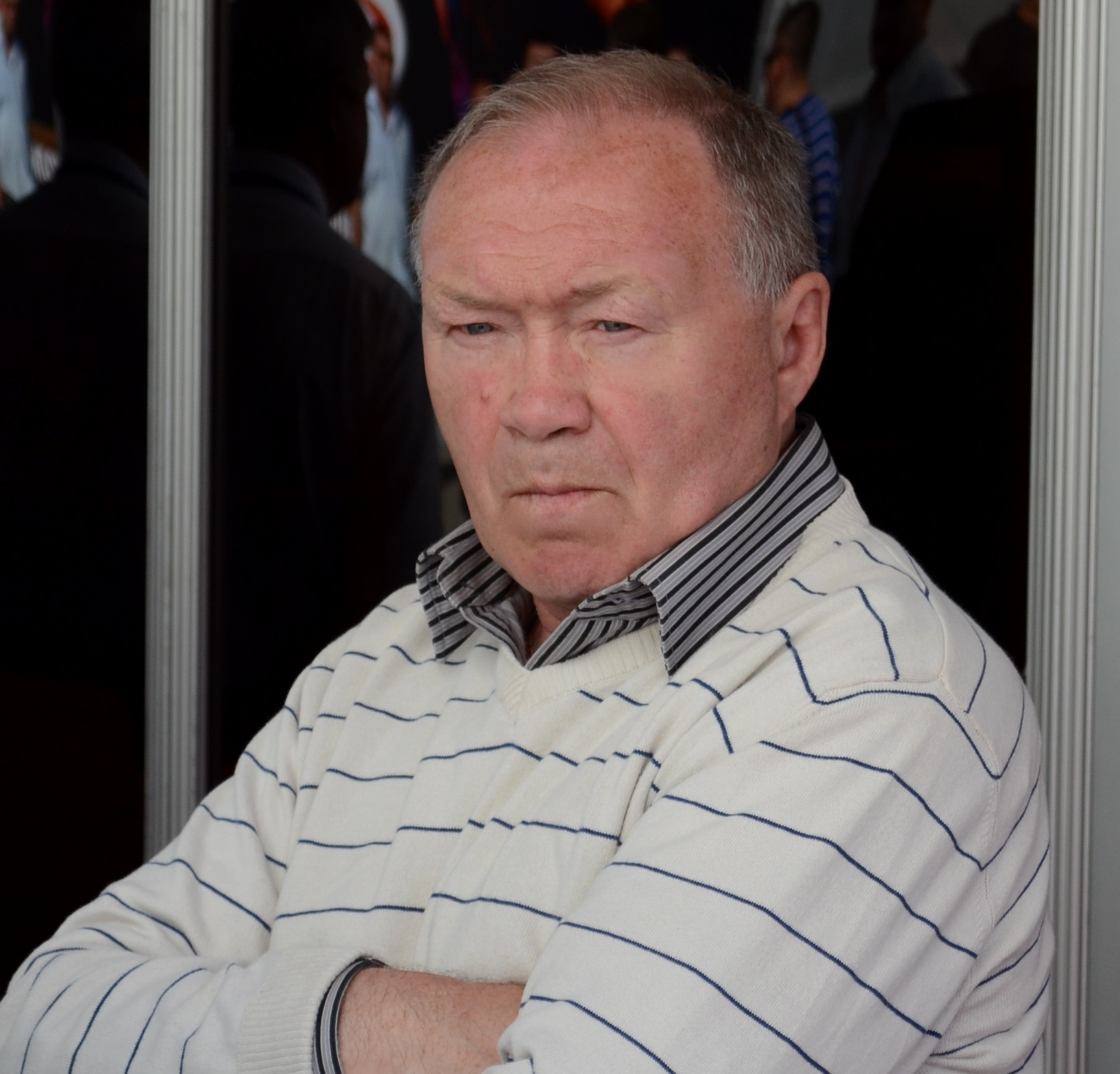 Актер Кузнецов, Юрий Александрович (Москва, выставка Интеравто-2011)